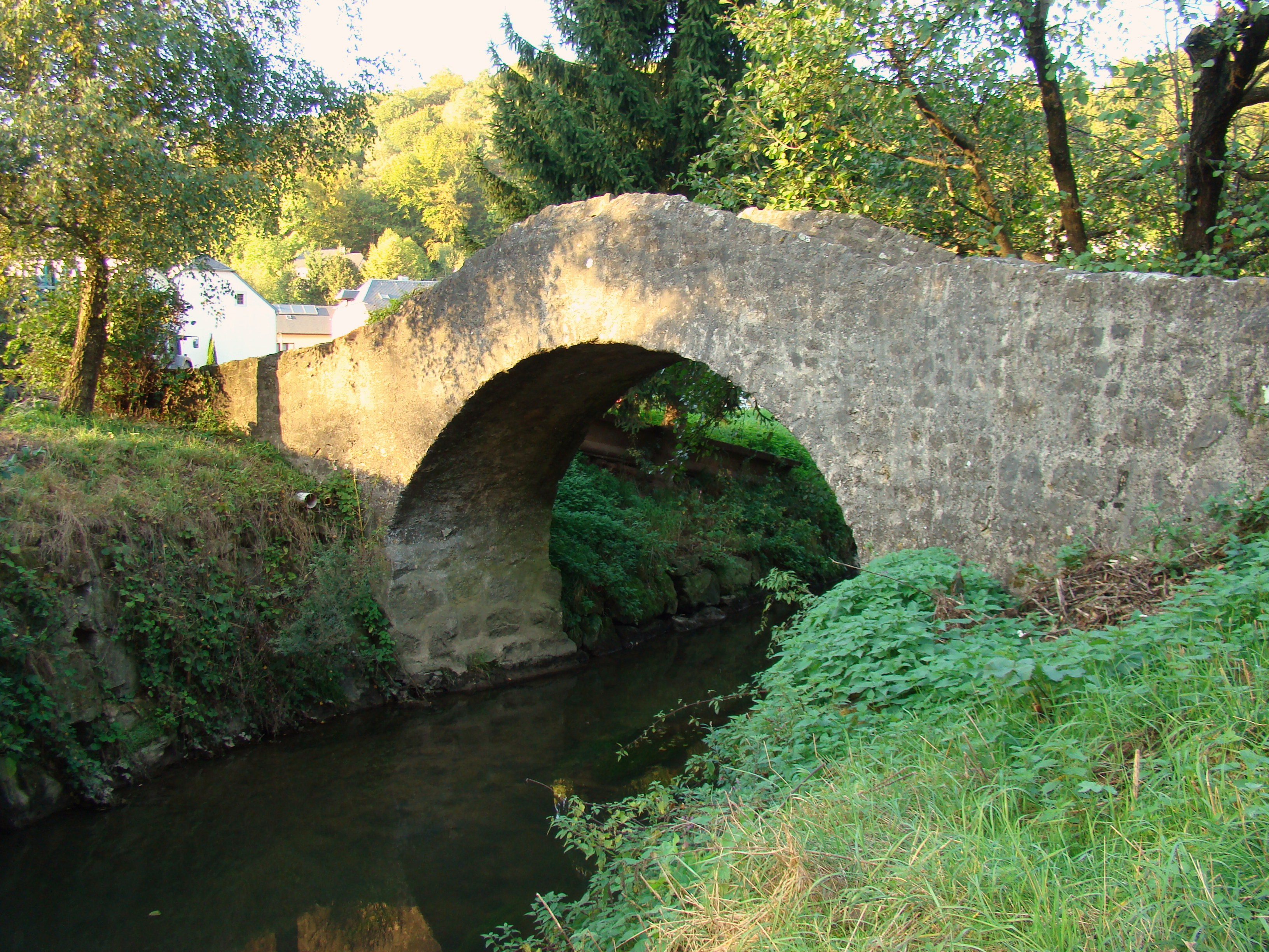 inscrit au cadastre de la commune de Septfontaines, section C de Septfontaines, sous les n° 28/1690 et 29/2716